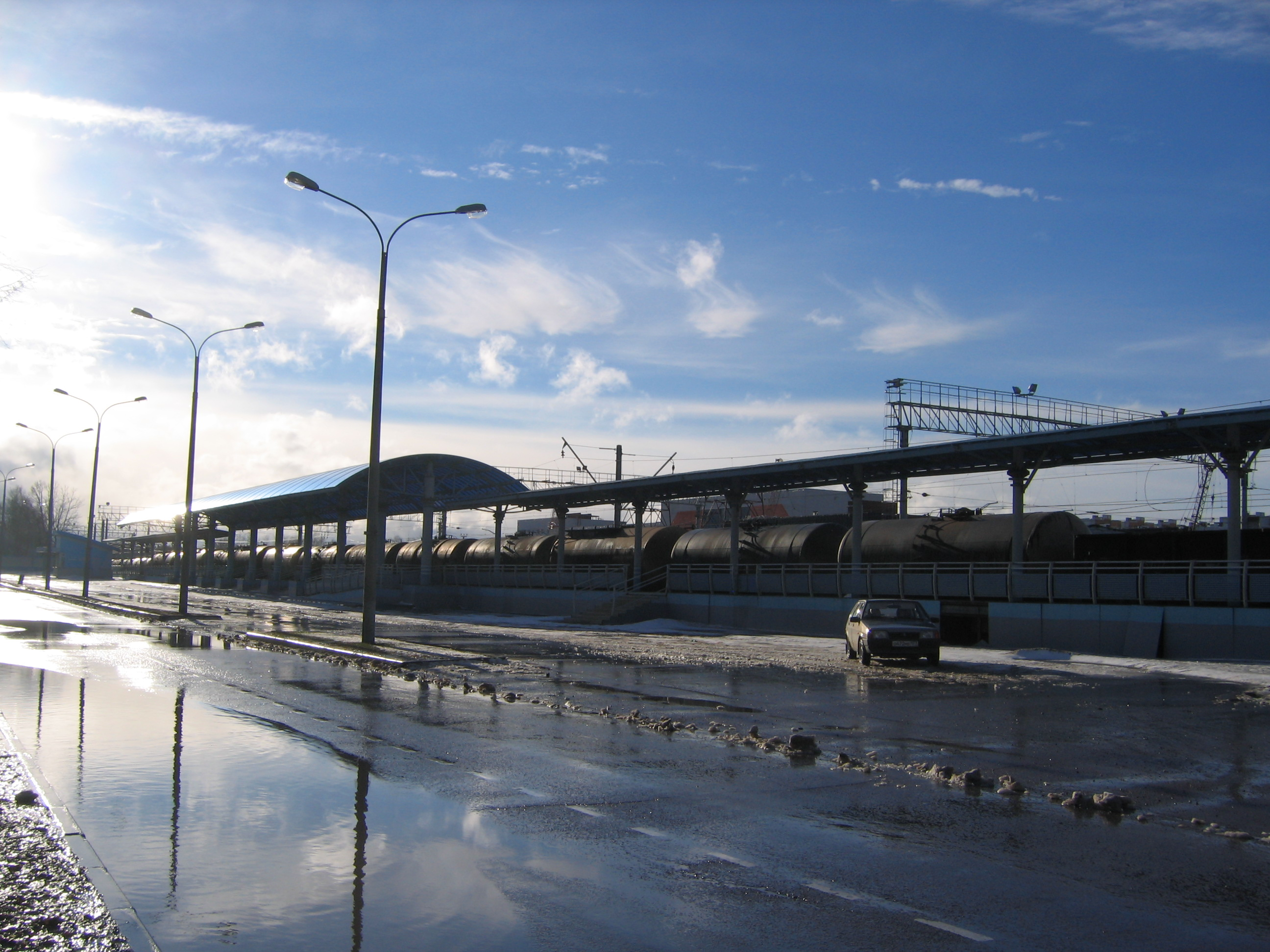 Пассажирская платформа станции Аэропорт (Внуково)